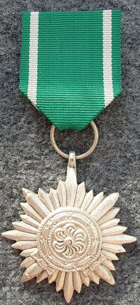 Onderscheiding voor de Oostelijke Volkeren, Nazi-Duitsland